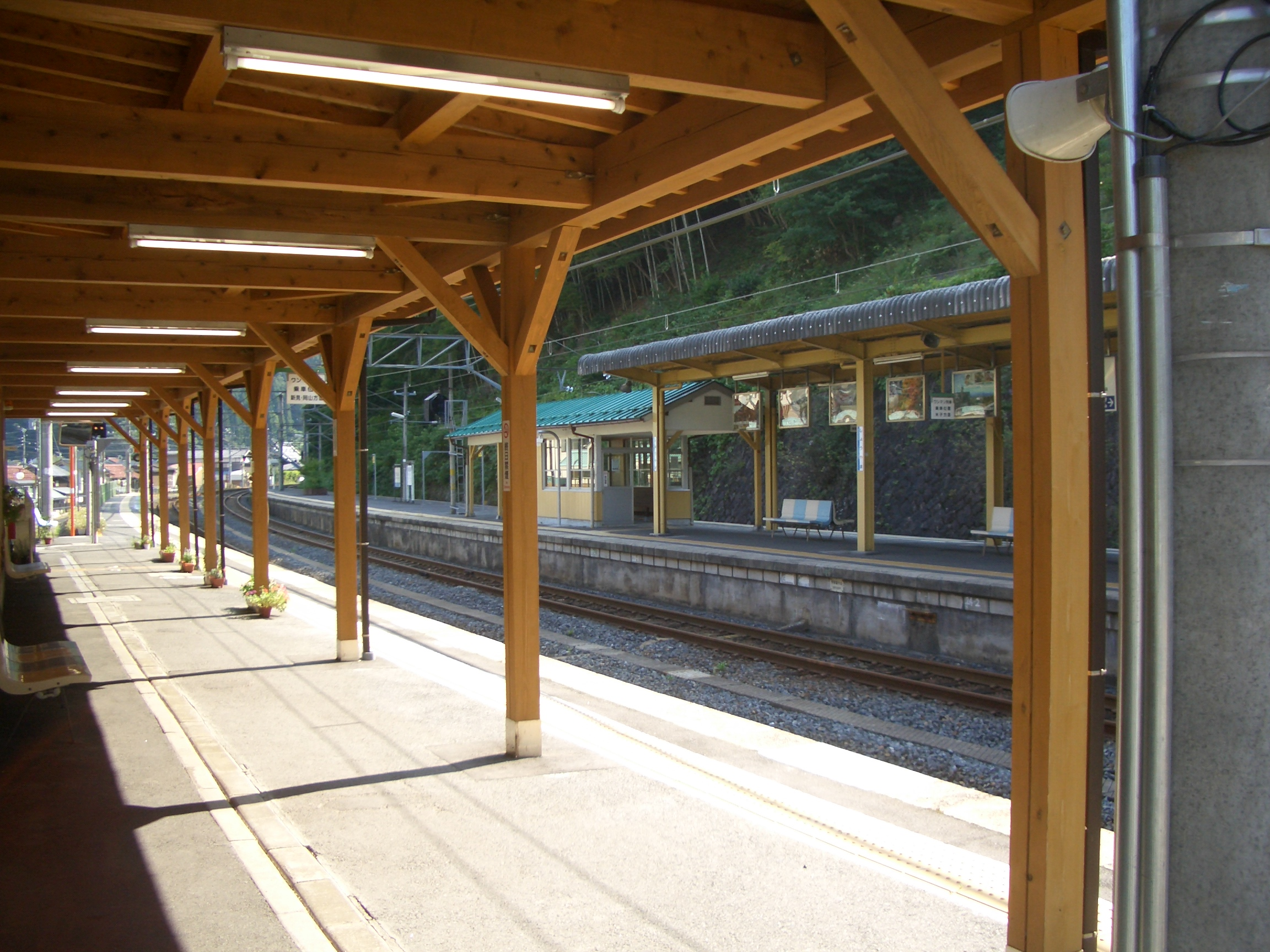 伯備線生山駅構内